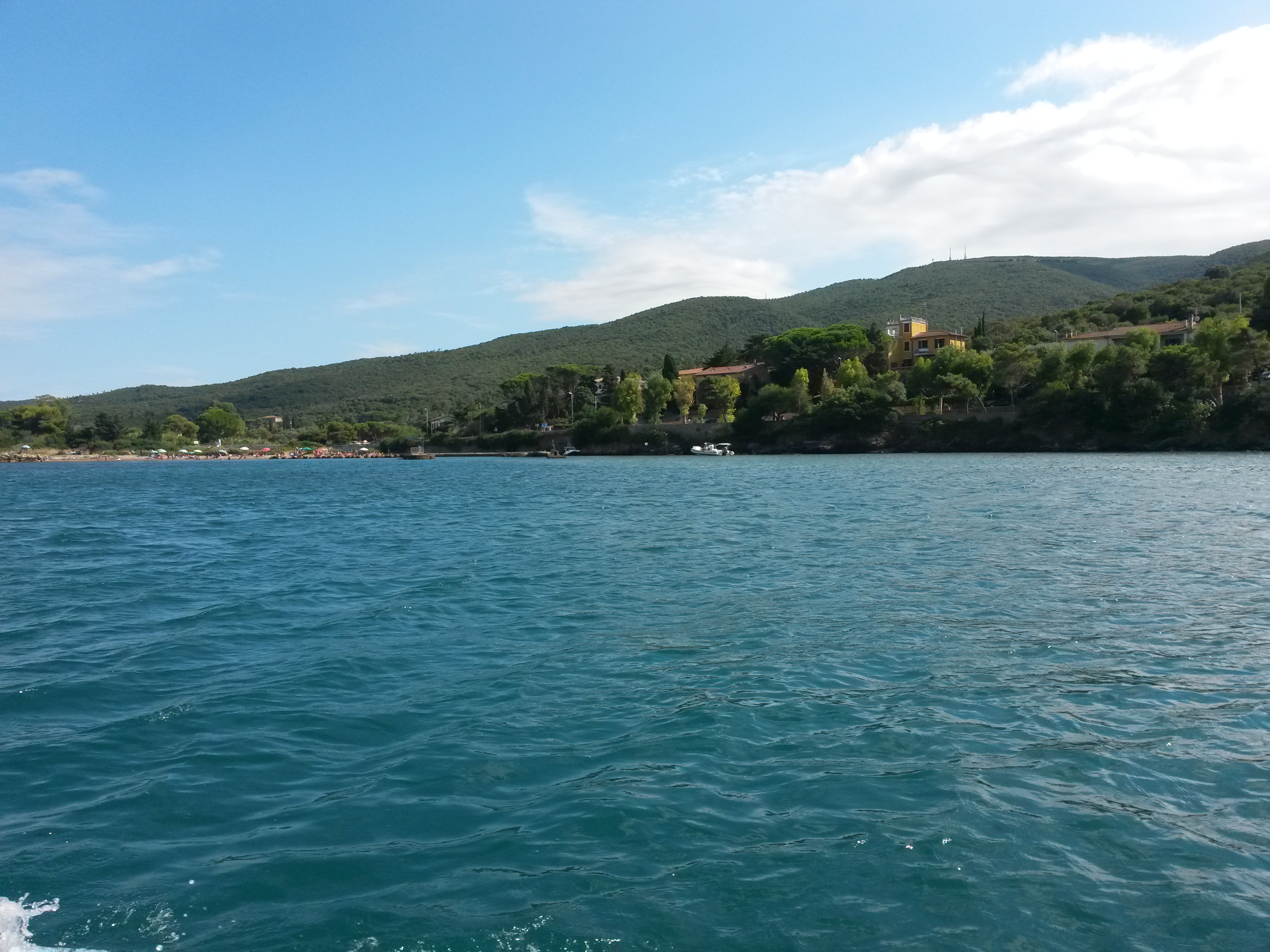 Entrata del porto canale di Santa Liberata.